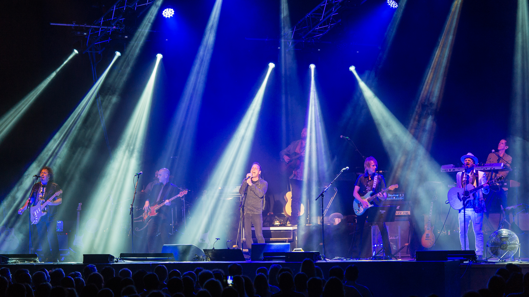 Alan Parsons Live Project,Concertbüro Franken,Konzert,Livekonzert,Livemusik,Meistersingerhalle,Musik